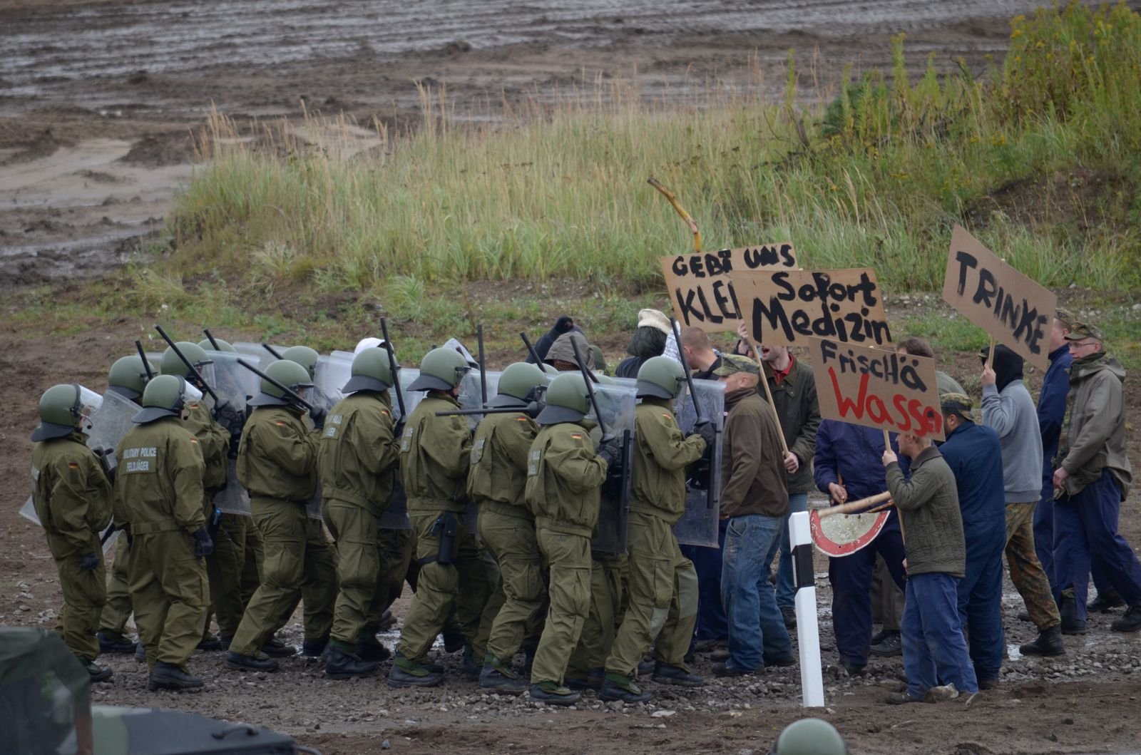 Eindrücke von der ILÜ 2012 der BW 24.09.2012)